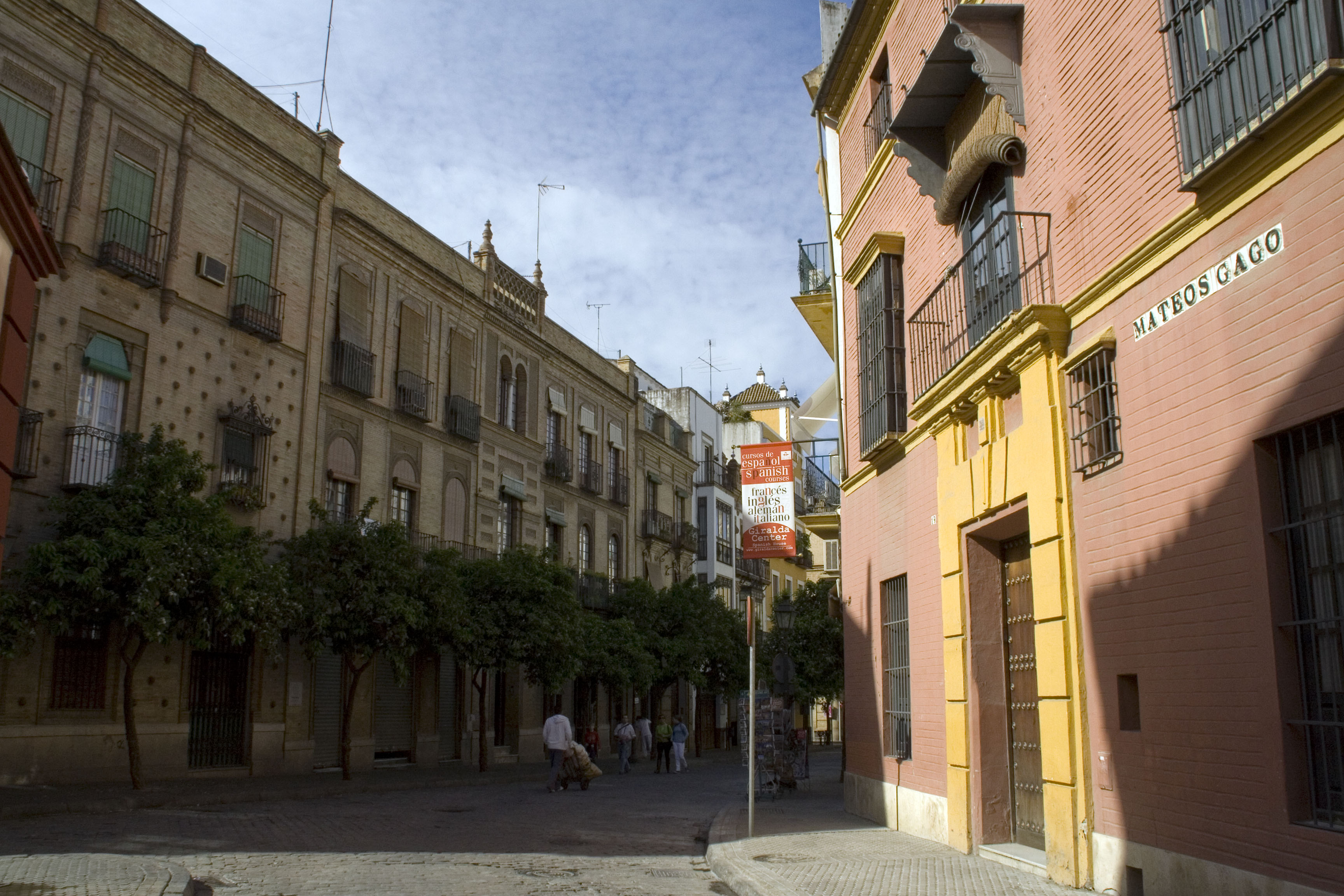 Calle Mateos Gago. Sevilla.